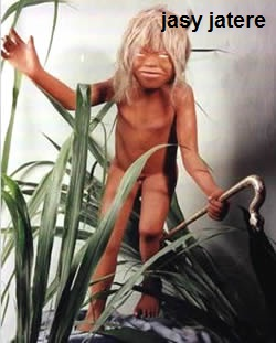 Representación artística del Jasy Jatere, uno de los hijos malditos de Tau y Kerana.